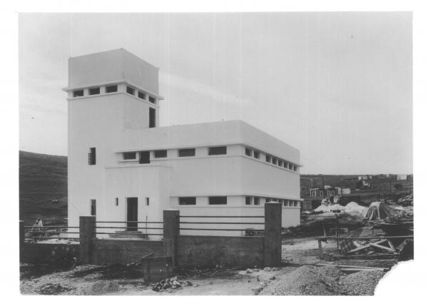 תחנת הכוח בטבריה שהוקמה בשנת 1925. היה בה מנוע דיזל שהפיק 100 כ"ס בלבד